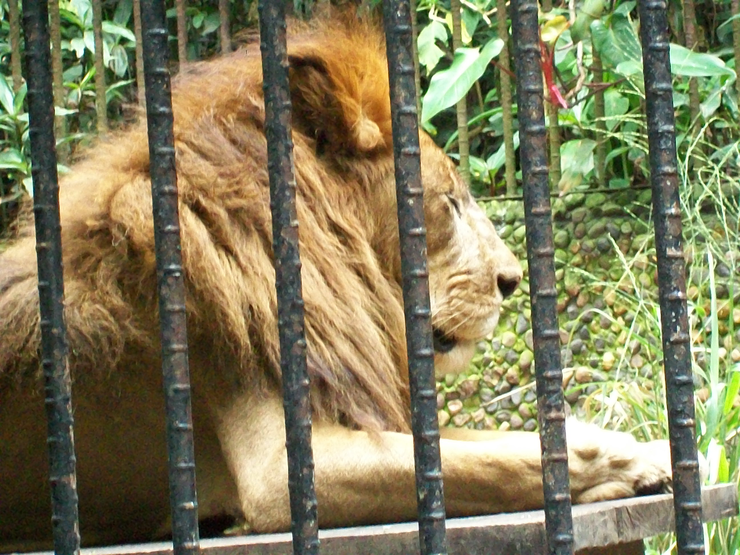 León africano llamado "Kivú", en su jaula del zoológico Simon Bolivar, San Jose, Costa Rica.